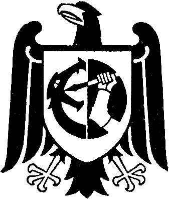 "Voici le répugnant insigne du Deutscher Fichte Bund marque de fabrique des imprimés hitlériens".